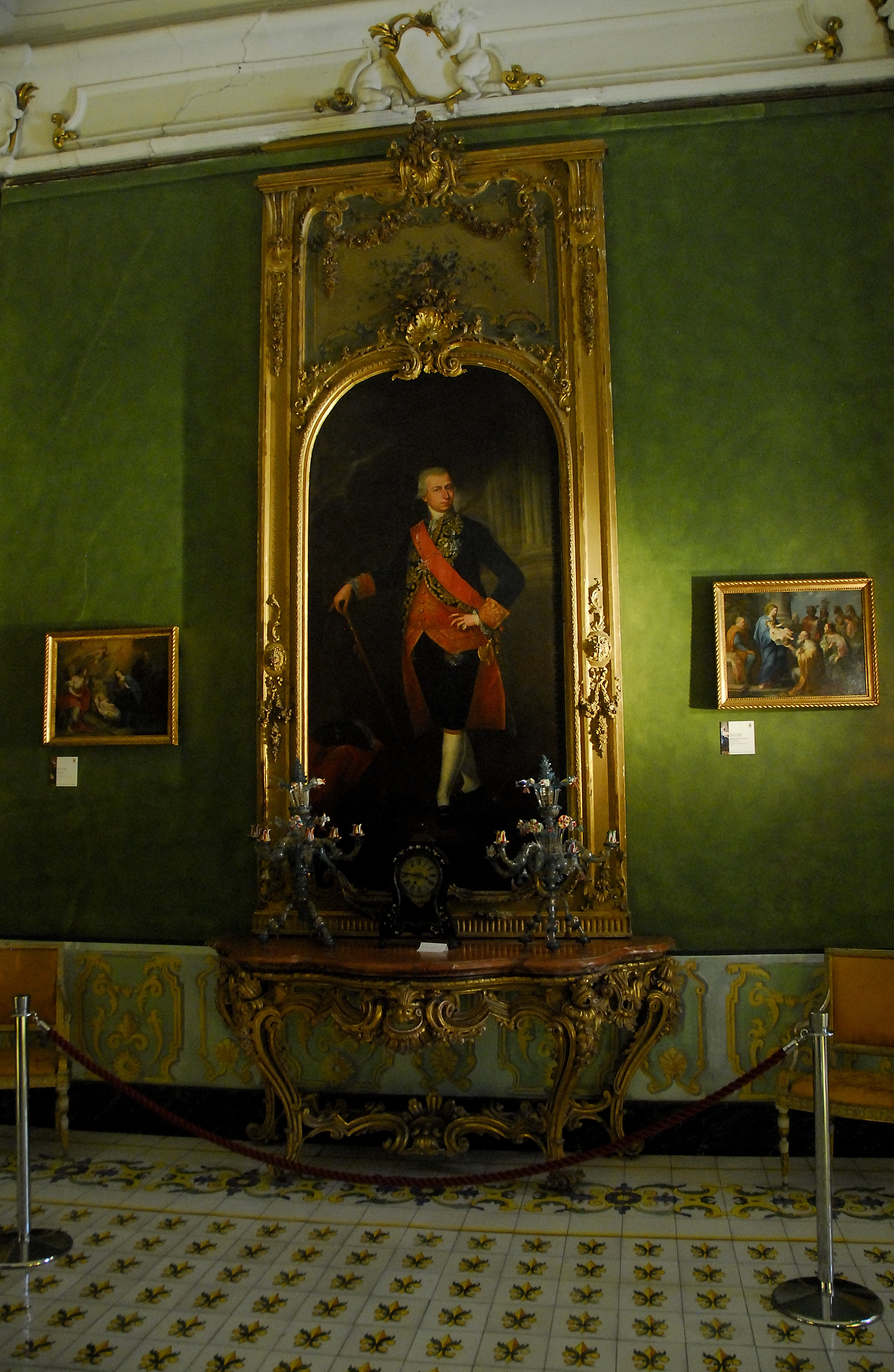 Palermo, ITA